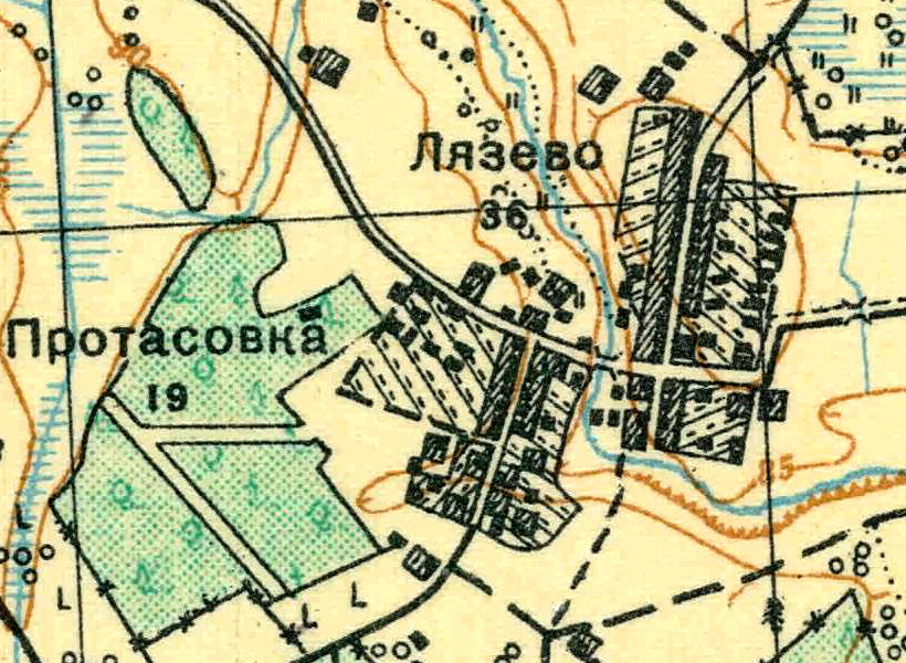 Топографическая карта Ленинградской области, квадрат О-36-25-А-а (Лампово), деревня Лязьево